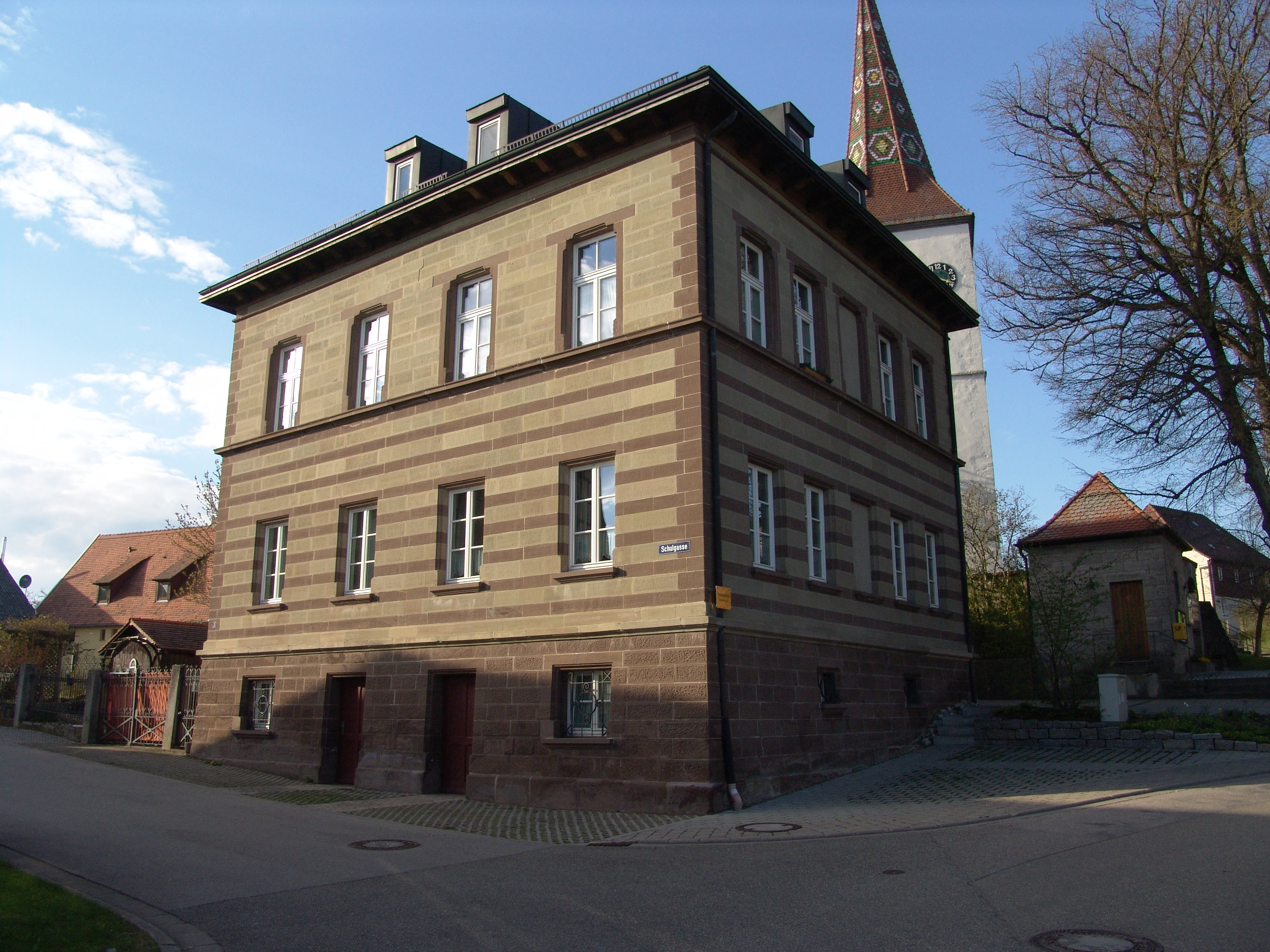 Oberampfrach Schulgasse 2